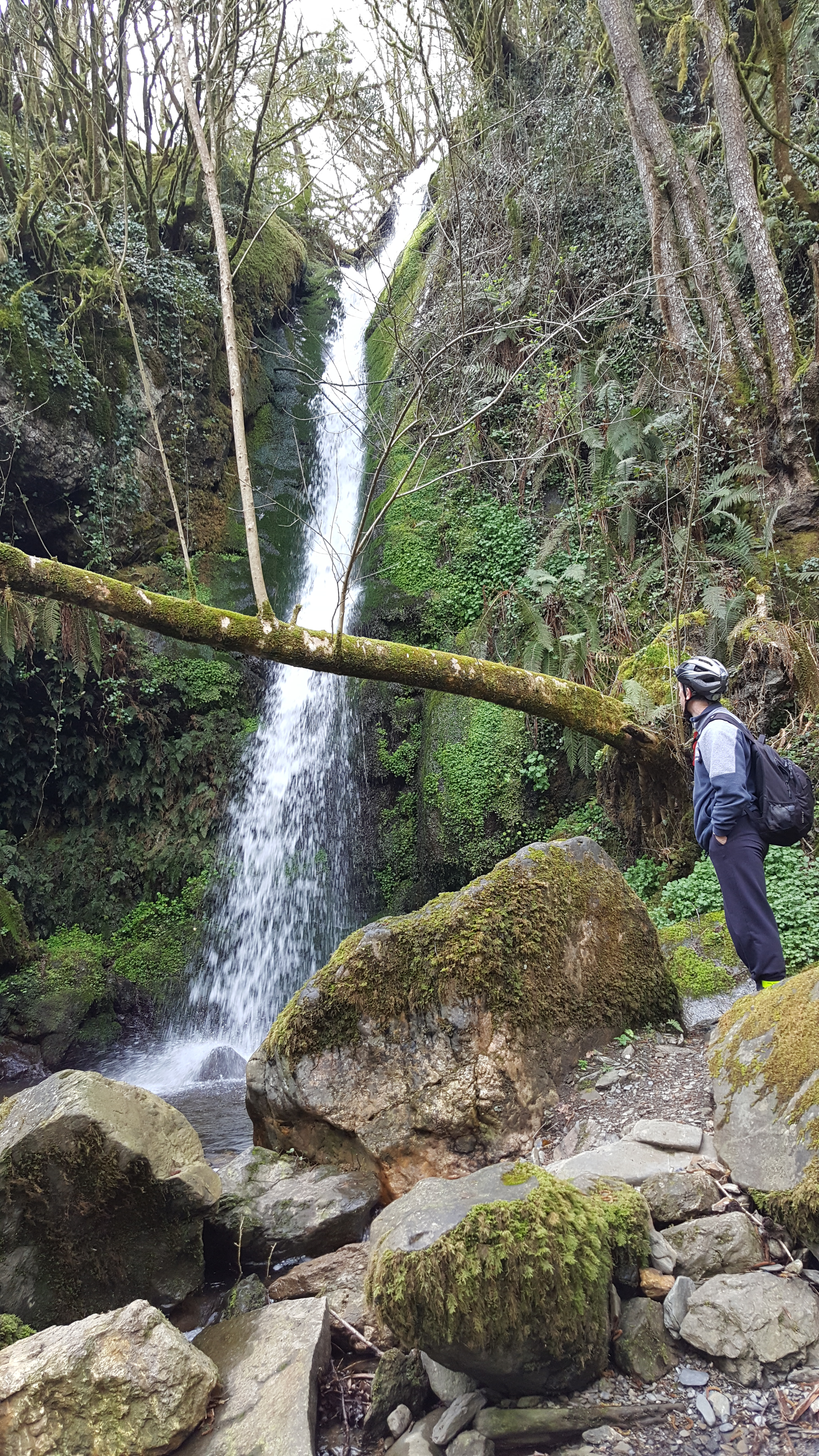 Bisusta ur-jauzia Sunbillan trenbide zaharreko bide berdearen parean.